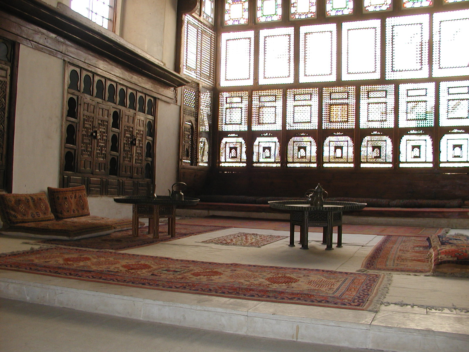 Salle de réception avec une grande moucharabieh, Maison es Suhaymi, Le Caire, Égypte.